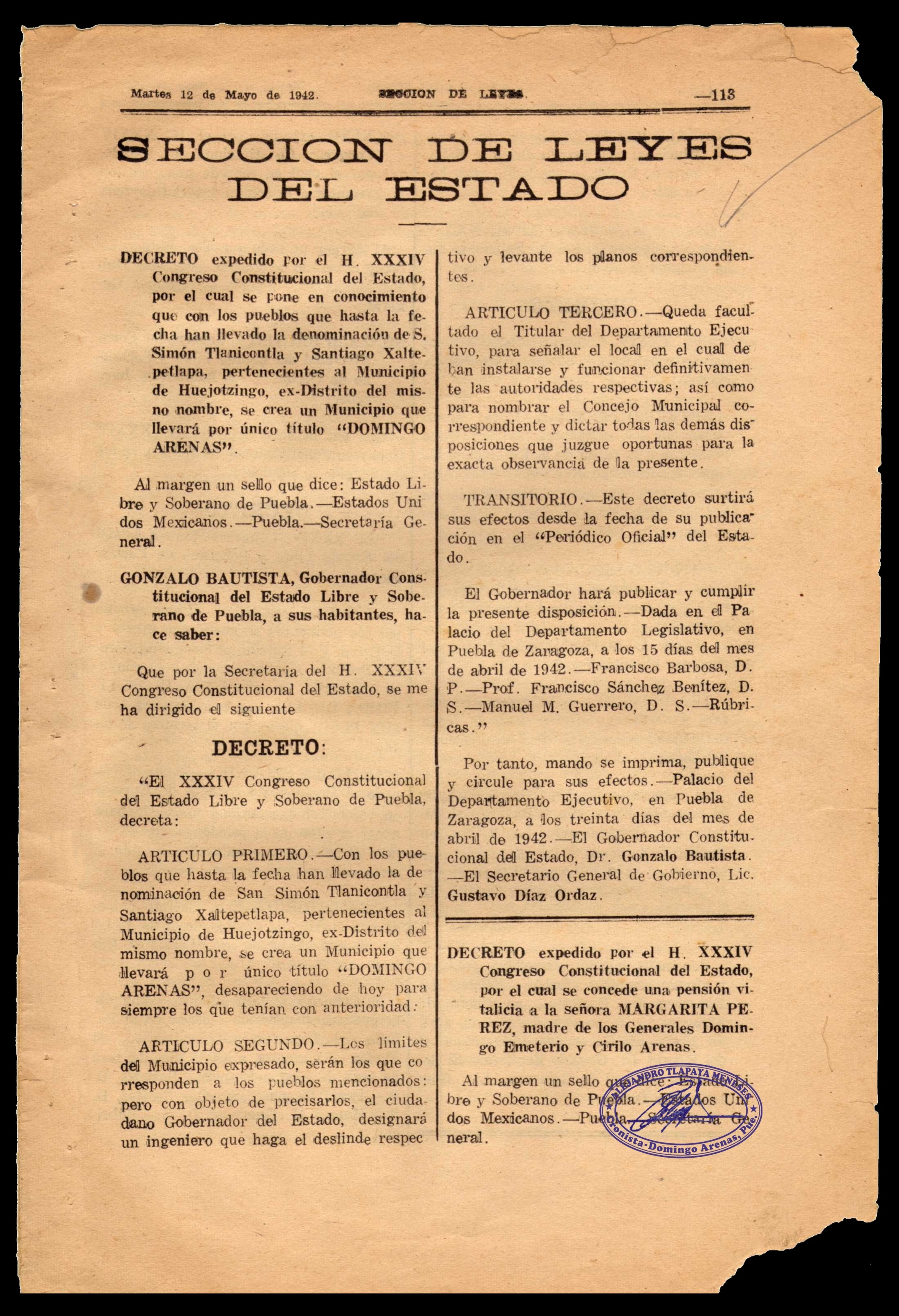 DECRETO del XXXIV Congreso del estado de Puebla, por el cual se pone de conocimiento que con los pueblos de san Simón Tlanicontla y Santiago Xaltepetlapa, se crea un municipio que llevará por título "DOMINGO ARENAS". Publicado en la Sección de Leyes del estado, el 12 de mayo de 1942 en el Periódico Oficial del estado de Puebla.